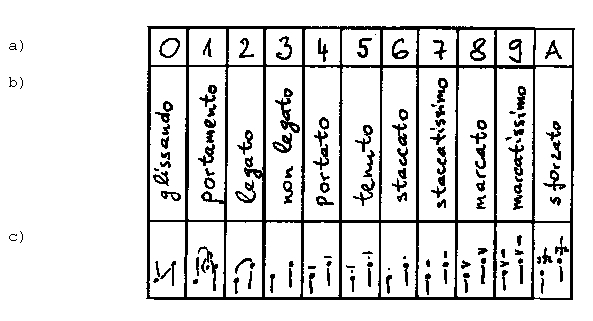 Rida artikulatsiooni parameetris: a) rea elemendi number, b) artikulatsiooni itaaliakeelne nimetus, c) artikulatsioonimärk noodikirjas. Rea koostamisel on püütud arvestada sellega, et reastatud artikulatsioonid oleksid teostatavad igal instrumendil